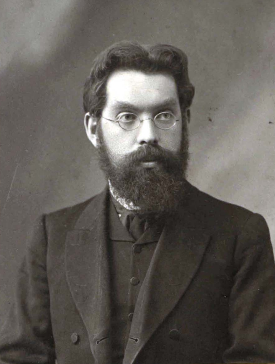 Фотокартка Голови Надзвичайної місії Української Народної Республіки до Грузії І. Красковського. м. Вільно. Травень 1913 р. Відділ рідкісних книг і рукописів Центральної бібліотеки імені Якуба Колоса НАН Білорусі. Ф. 16. Оп. 1. Спр. 160. Арк. 18